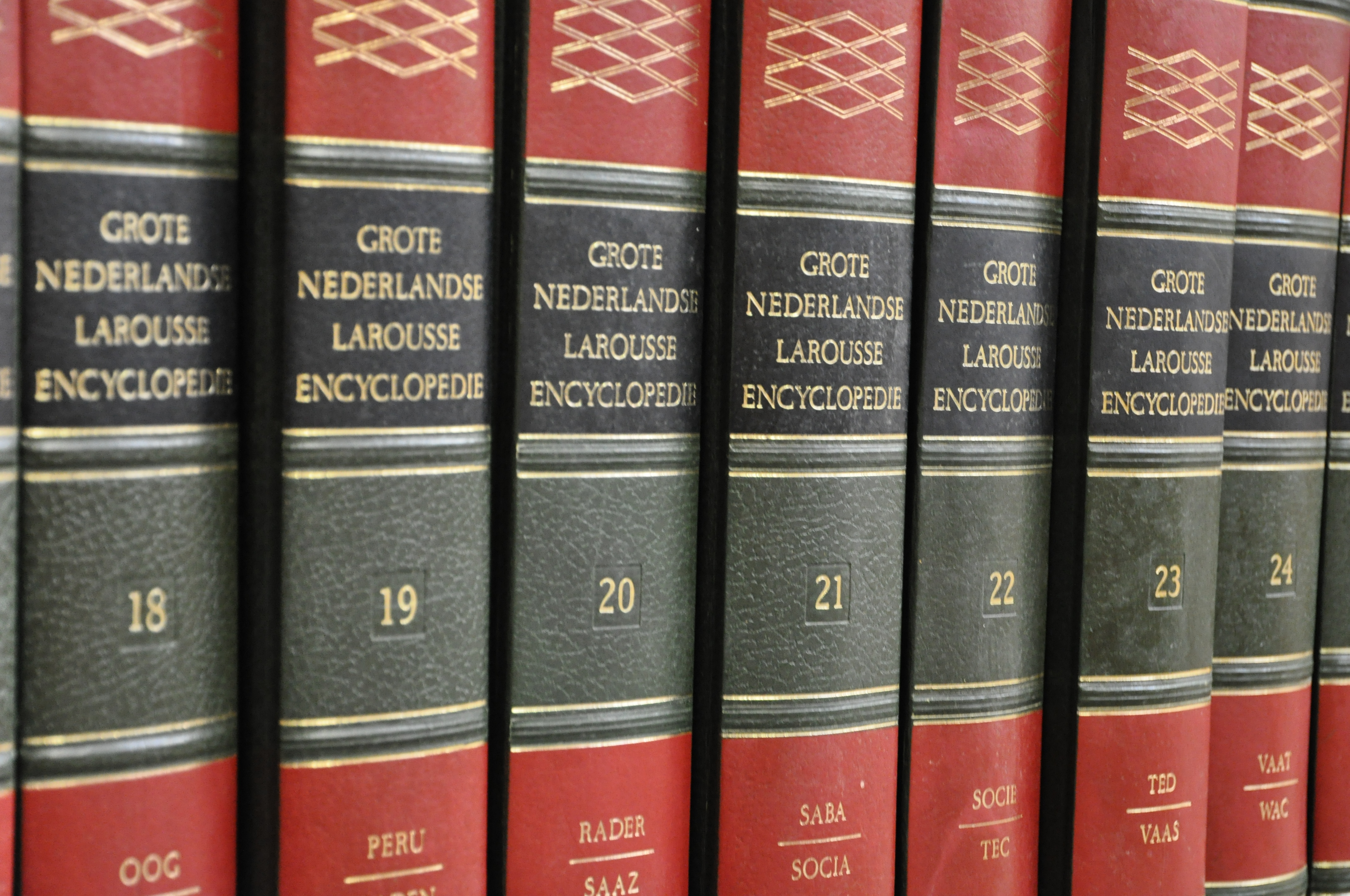 Boeken in de kringloopwinkel in Woerden.